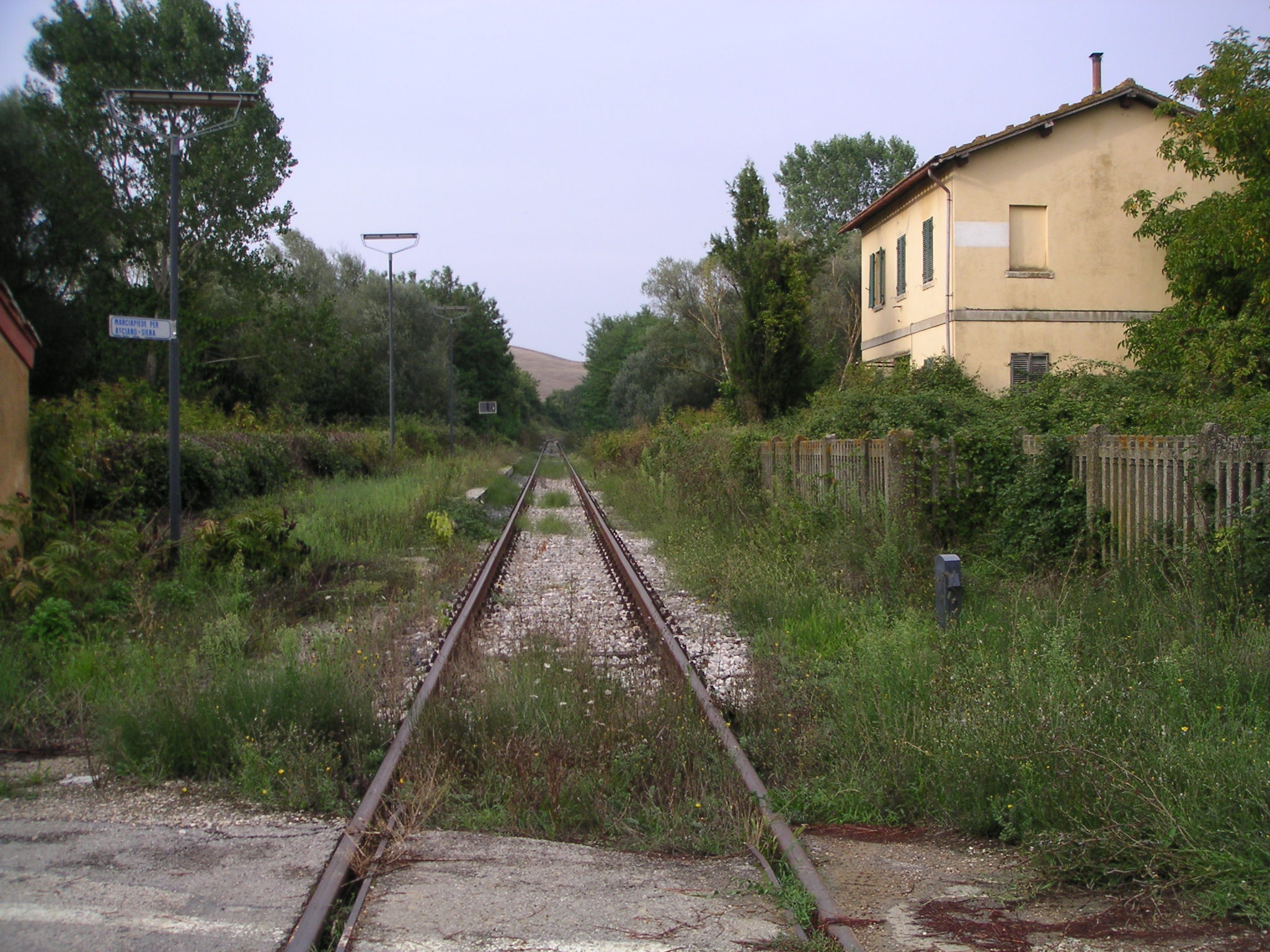 I binari della ferrovia Asciano-Monte Antico in direzione di Siena all'altezza della stazione di Trequanda